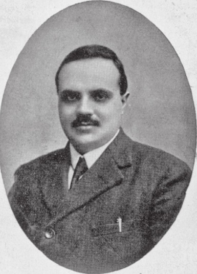 Bindo Chiurlo